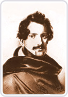 Giuseppe Gioacchino Belli (1791 - 1863), Italian poet